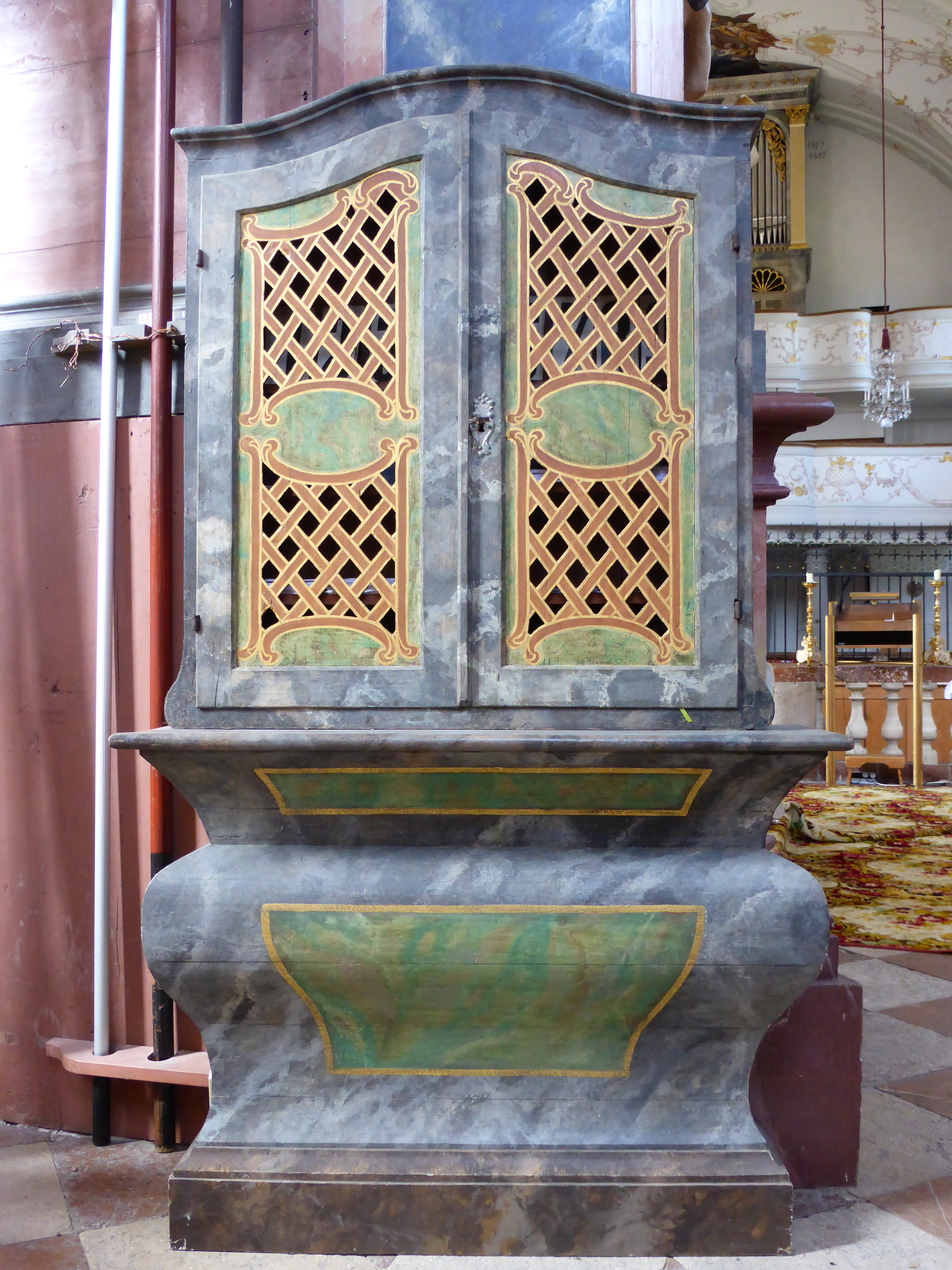 Voliere, bis 1870 für das "opfern" von schwarzen Hühnern gebäuchlich